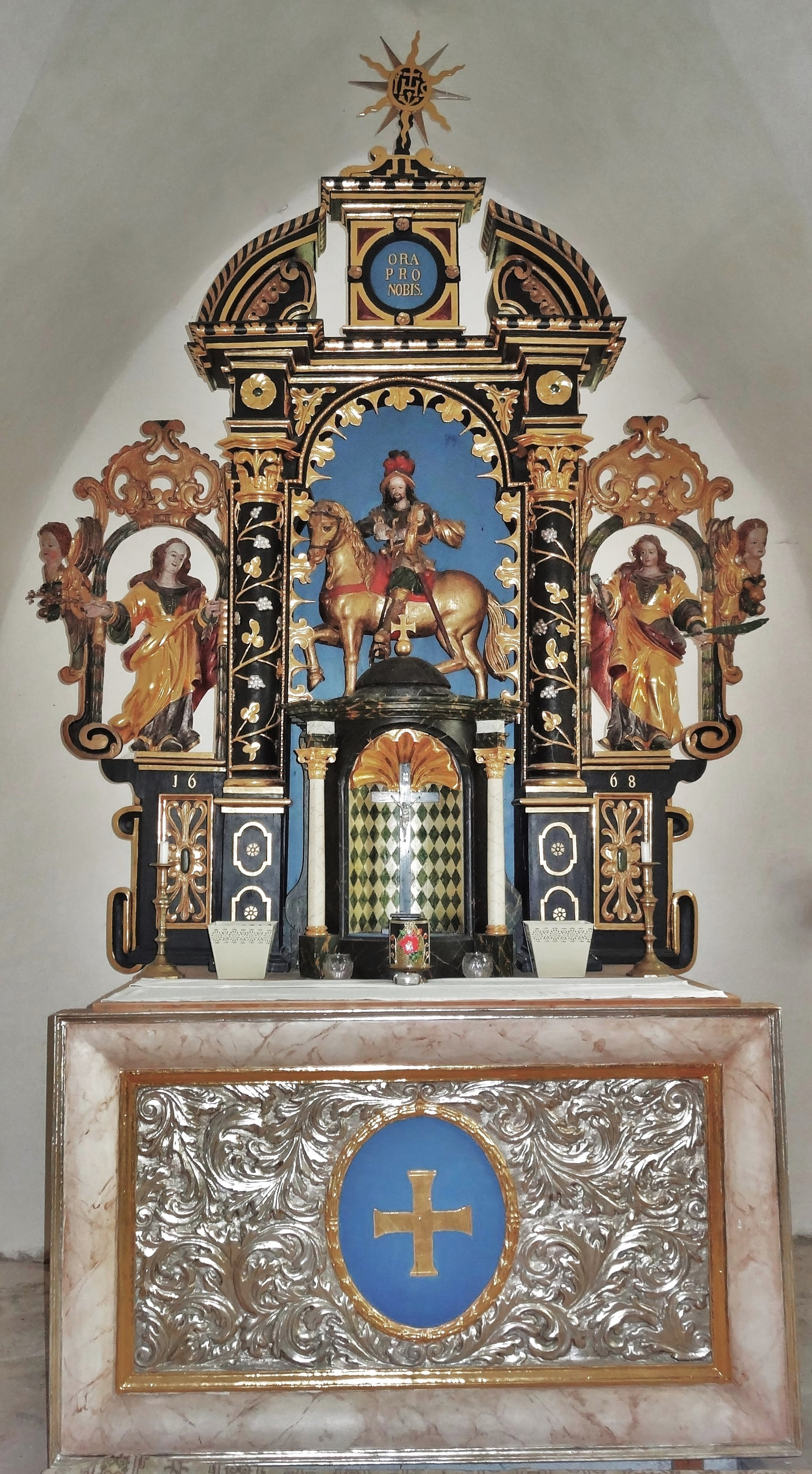 Der Hochaltar der kath. Filialkirche St. Martin, Launsdorf